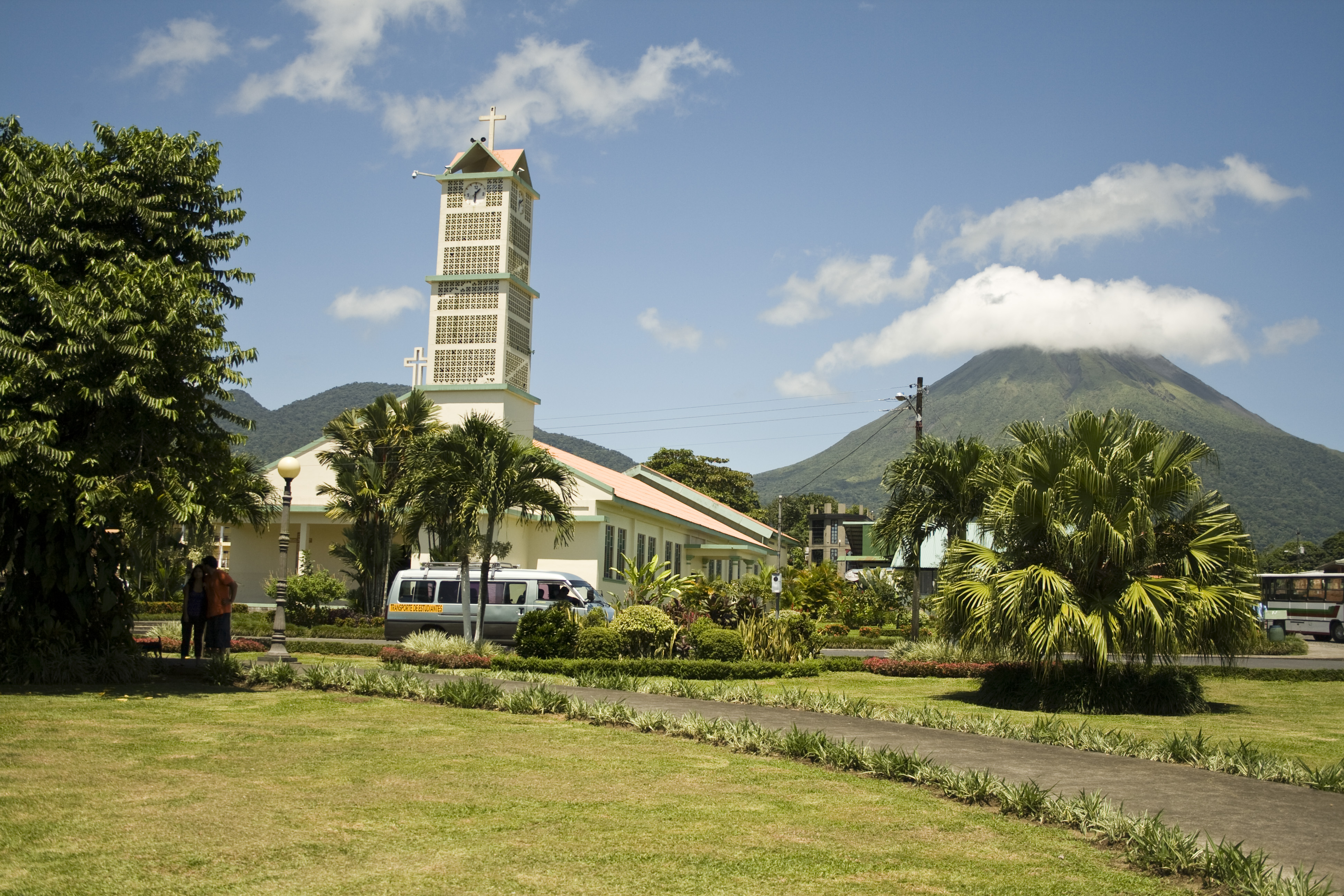 Parque de La Fortuna de San Carlos. Provincia de Alajuela. Costa Rica.